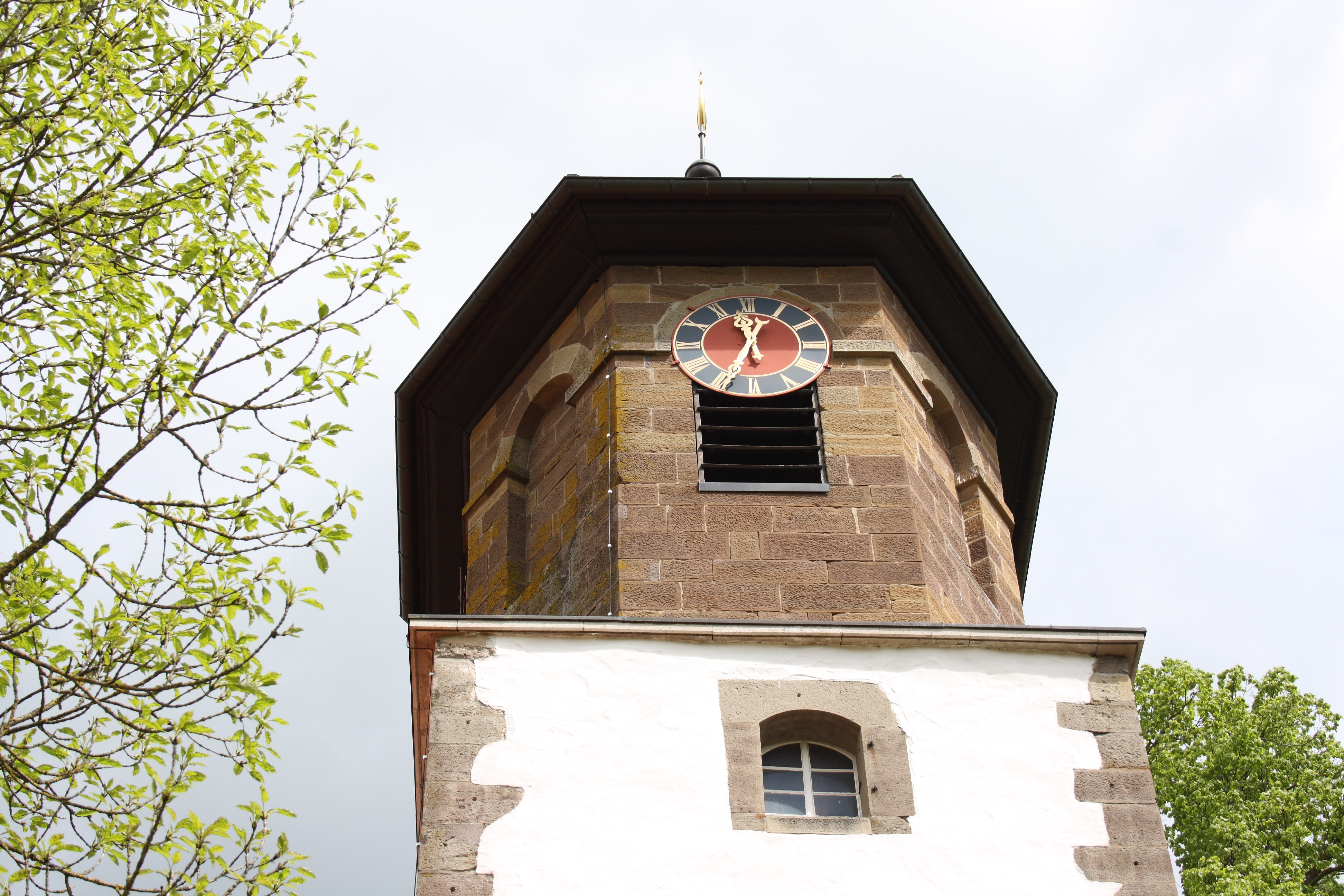 evangelische Kirche in Lorenzenzimmern, einem Stadtteil von Vellberg im Landkreis Schwäbisch Hall (Baden-Württemberg